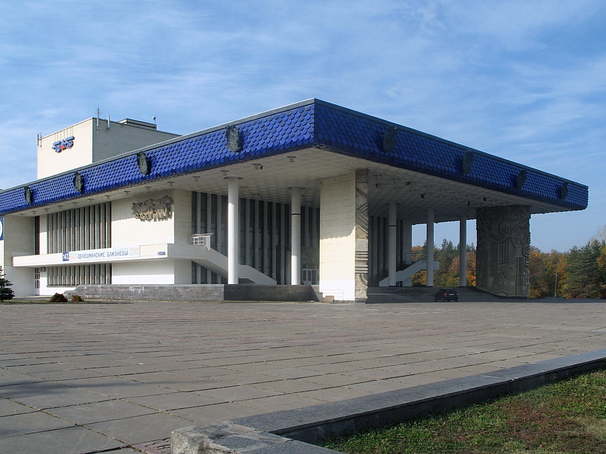 Русский драматический театр в Уфе